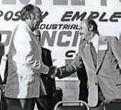 Presidente José López Portillo con Mario H. Gottfried Gutiérrez, en la inauguración de la nueva nave de Potencia Industrial,S.A., en 1976. Fuente: Potencia Industrial, S.A. Fecha: 1976 Archivo derivado=2014